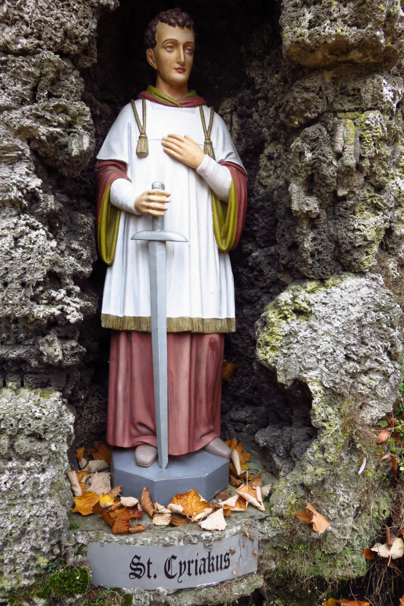 Christliche Figuren in Mönchengladbach